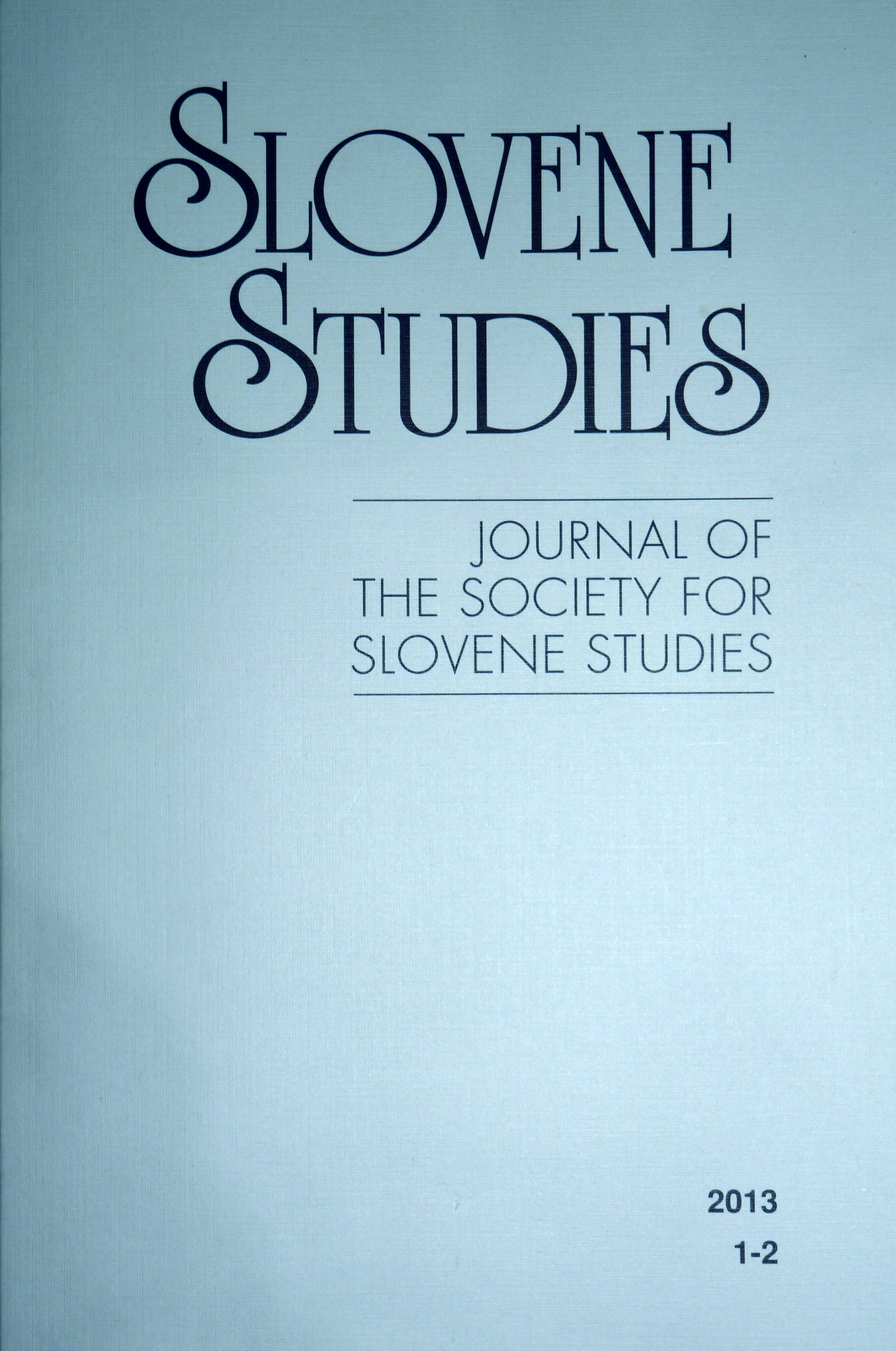 Naslovnica revije Slovene Studies